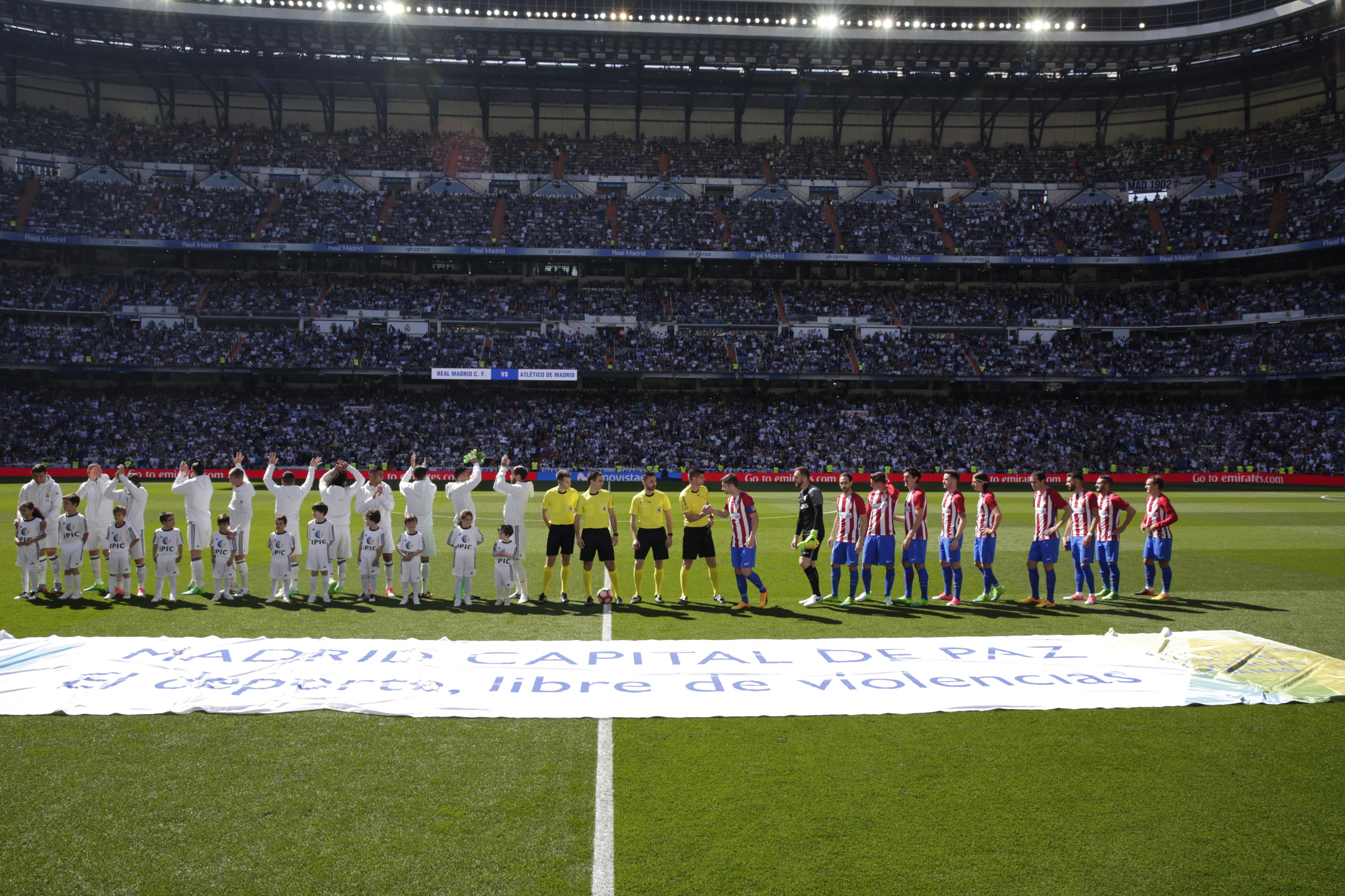 Momentos antes del inicio del derby madrileño, el césped del estadio Santiago Bernabéu ha acogido una lona elaborada por el Ayuntamiento de Madrid con el mensaje ‘Madrid, capital de paz’. El deporte, libre de violencias’. La primera teniente de alcalde, Marta Higueras, y el coordinador de Alcaldía, Luis Cueto, han asistido al partido en el que Real Madrid y Atlético de Madrid han apoyado esta iniciativa, preludio del Foro Mundial sobre las Violencias Urbanas y Educación para la Convivencia y la Paz que el Consistorio pilotará del 19 al 21 de abril.